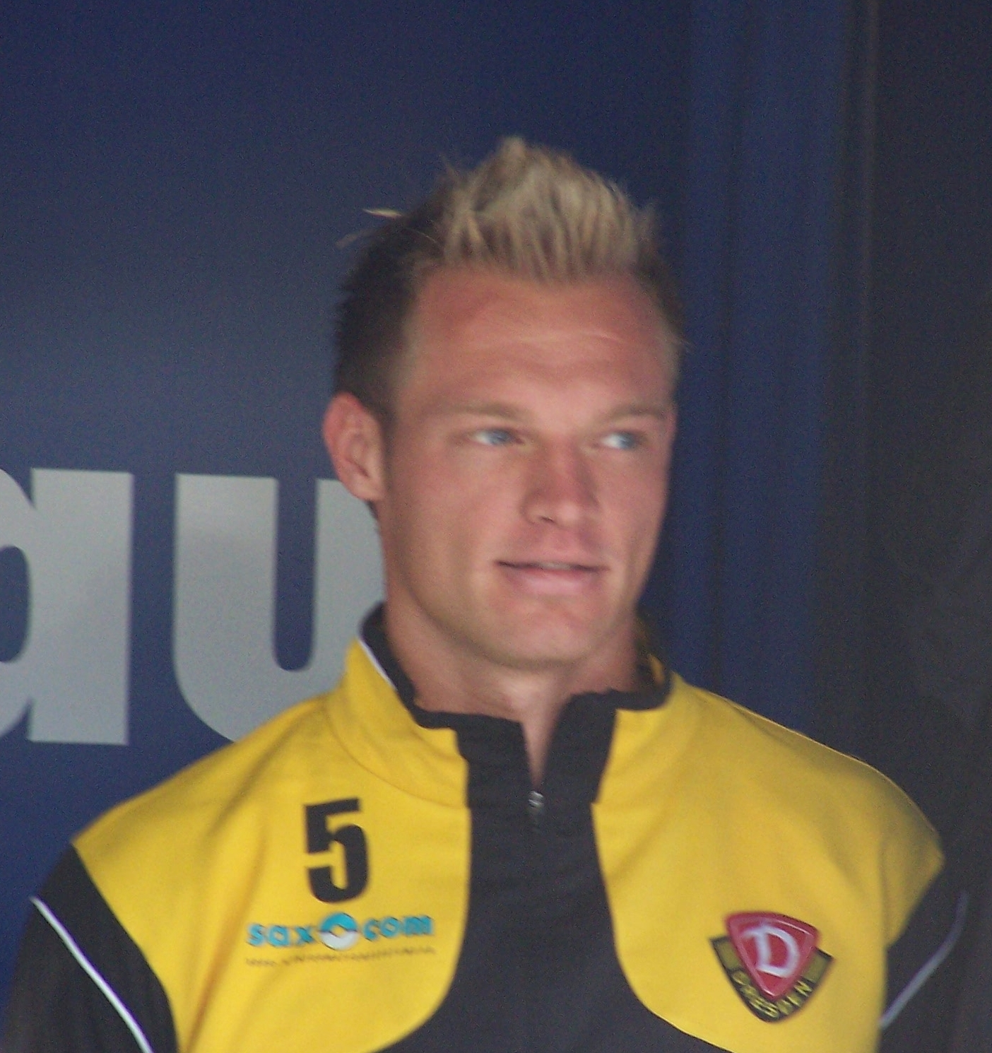 Thomas Hübener bei der Teampräsentation von Dynamo Dresden zum Start der Drittliga-Saison 2008/09